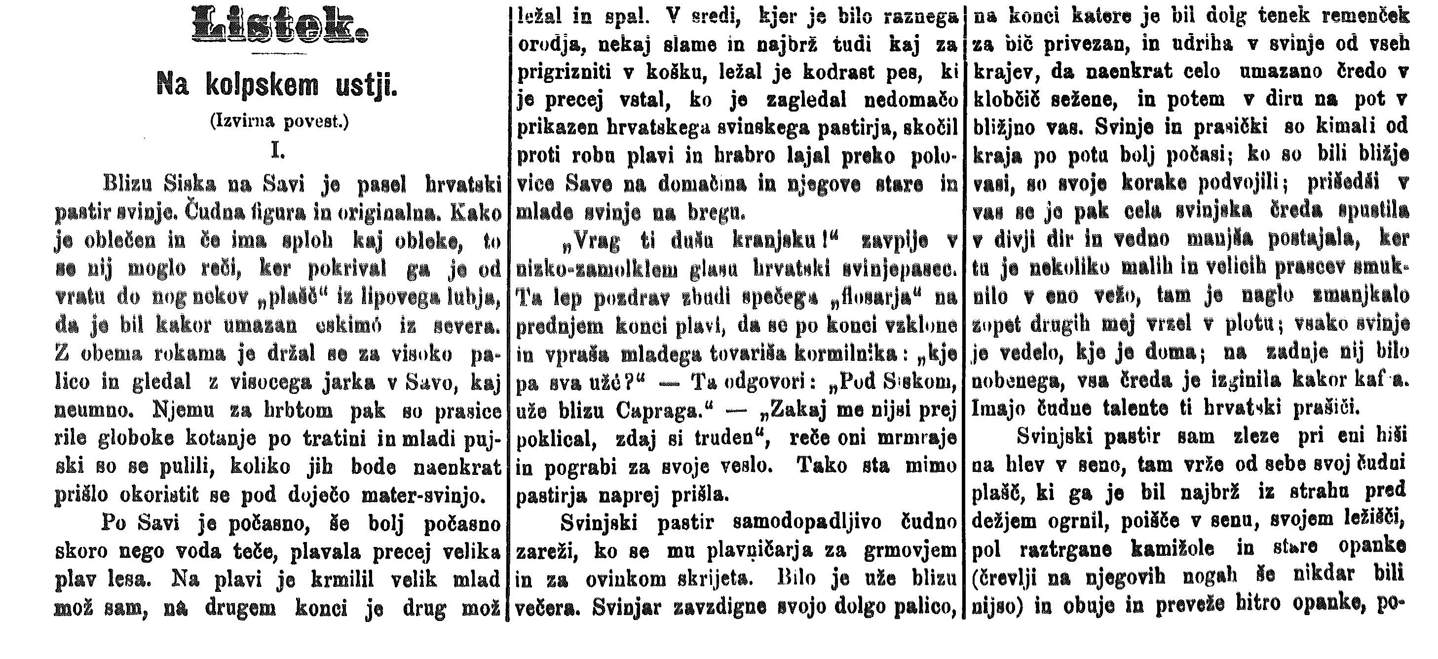 Začetek povesti Josipa Jurčiča z naslovom Na kolpskem ustju. Povest je izšla v časopisu Slovenski narod leta 1874.